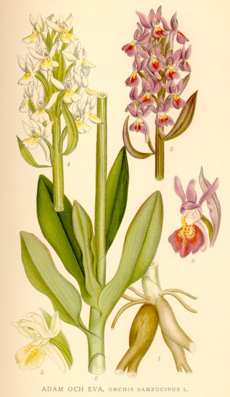 Adam och Eva, Orchis sambucinus L. - Dactylorhiza latifolia